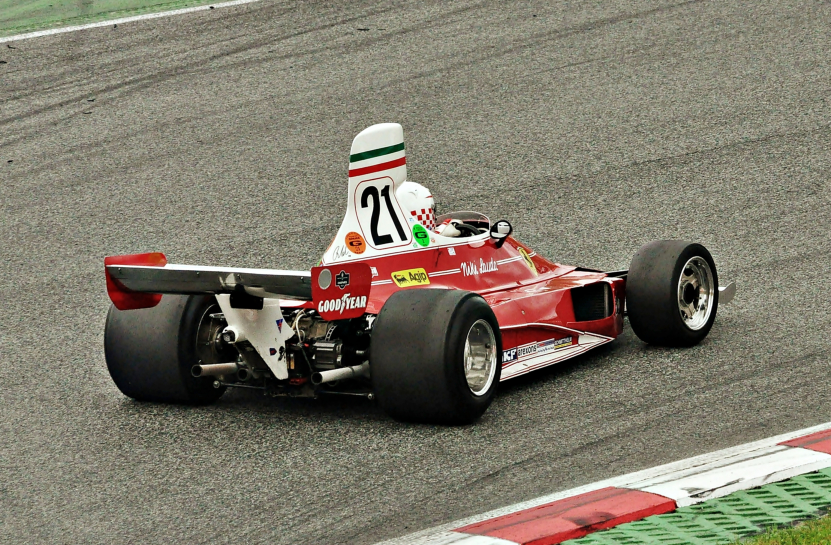 carrera de clasicos de f1-circuito de cataluña-2012